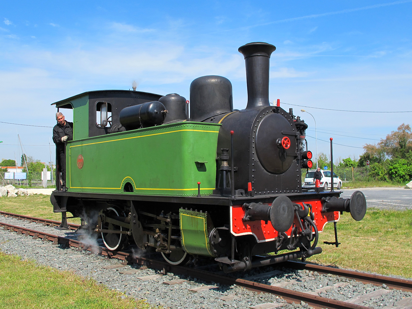 La locomotive 020 T Meuse (n° de constructeur 3107) du train touristique de Guîtres à Marcenais.